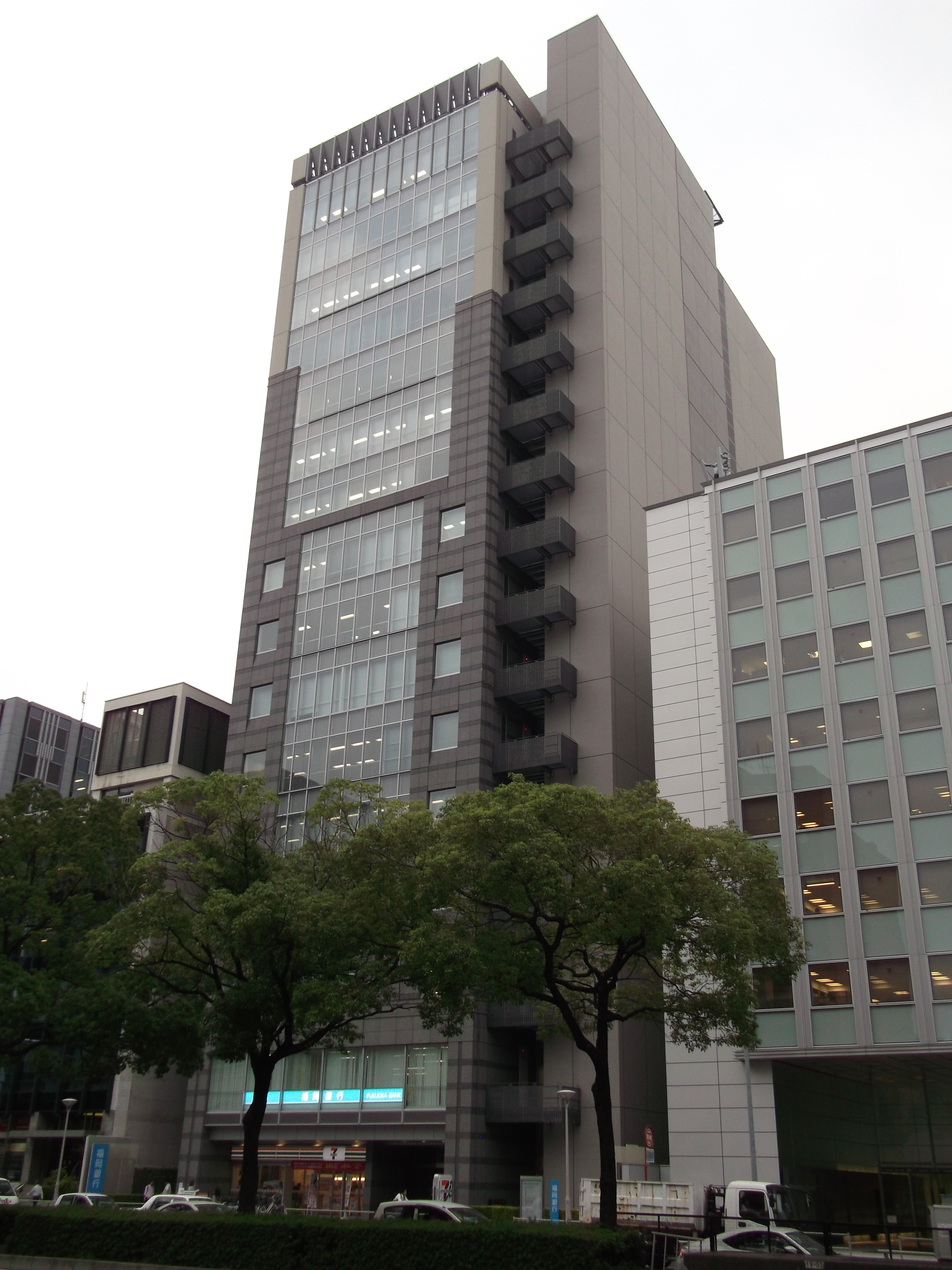 名古屋市中区のオリックス名古屋錦ビルを東側公道北側より撮影